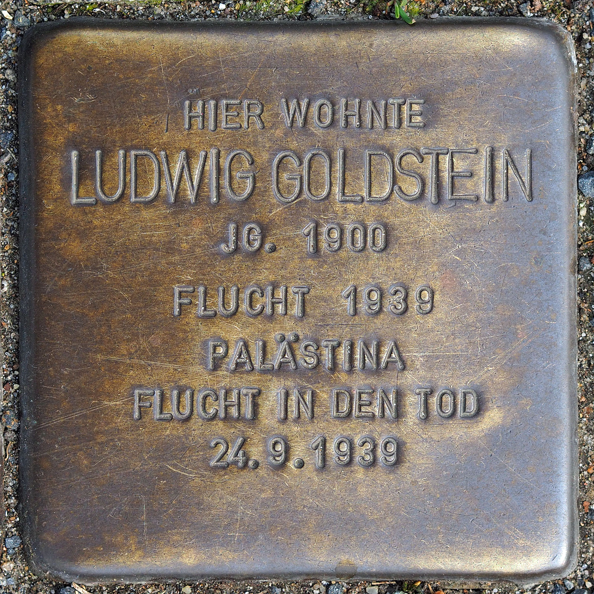 Stolpersteine GV: Goldstein, Ludwig